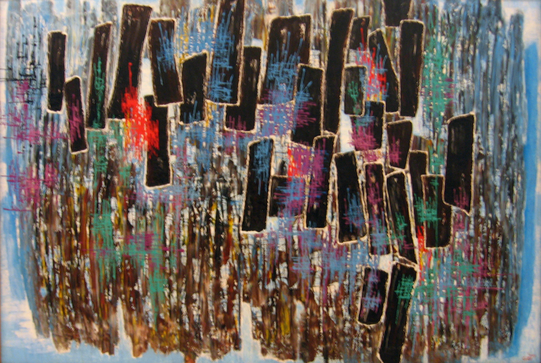 Painting